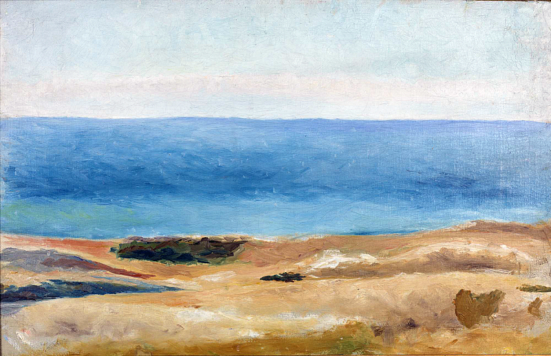 Havsstrand Gotland 1889 (nm4980)